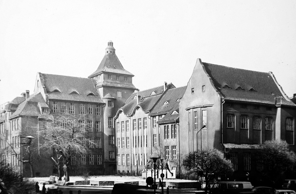 Katowice, ul. Jagiellońska 28